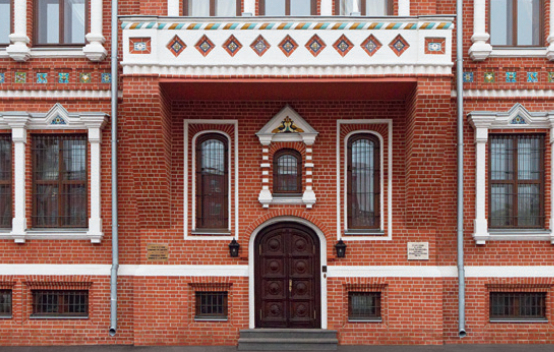 Подъезд особняка Цветкова после реставрации 2016